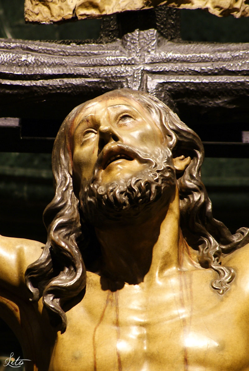 Fotografía propia realizada por Manuel Francisco Álvarez Ruiz.